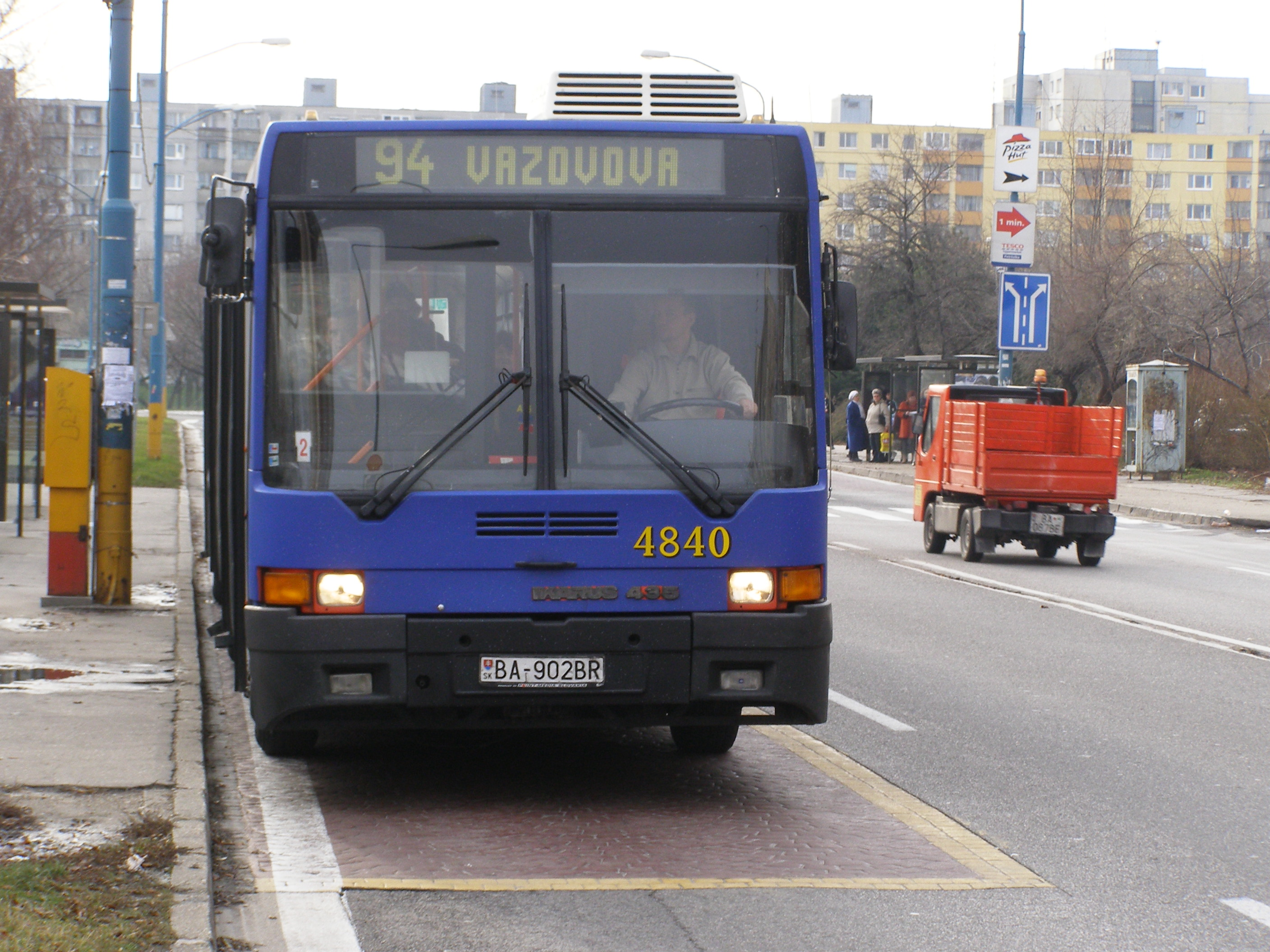 Ikarus 435.18F in Petržalka, Bratislava. Year built 1998.